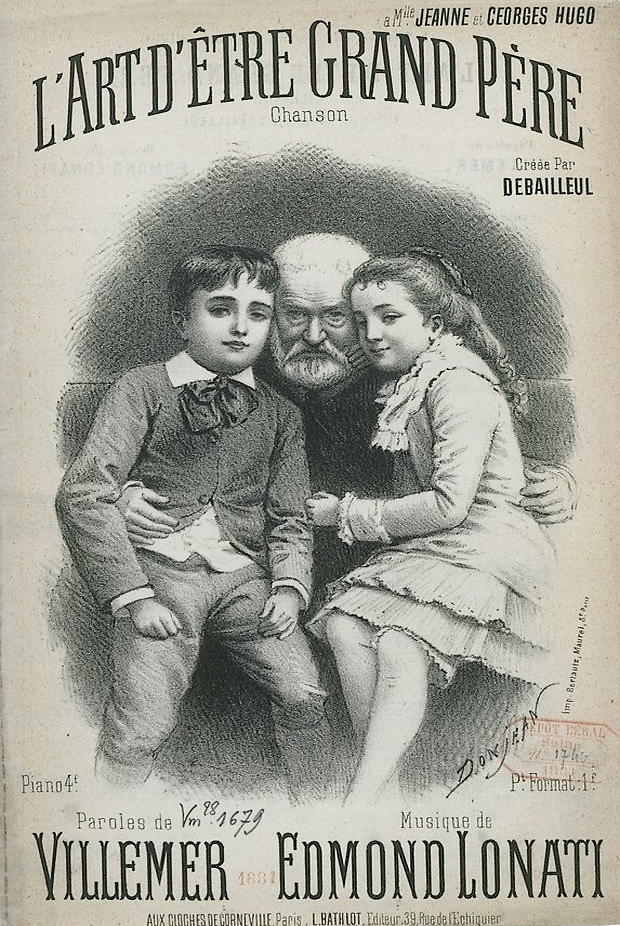 Partition de la chanson L'Art d'être Grand-Père (1881), d'après une photo de Victor Hugo, Jeanne et Georges Hugo. Gravure de Gustave Donjean. Numérisation Gallica, Bibliothèque nationale de France, département Musique, VM28-1679.